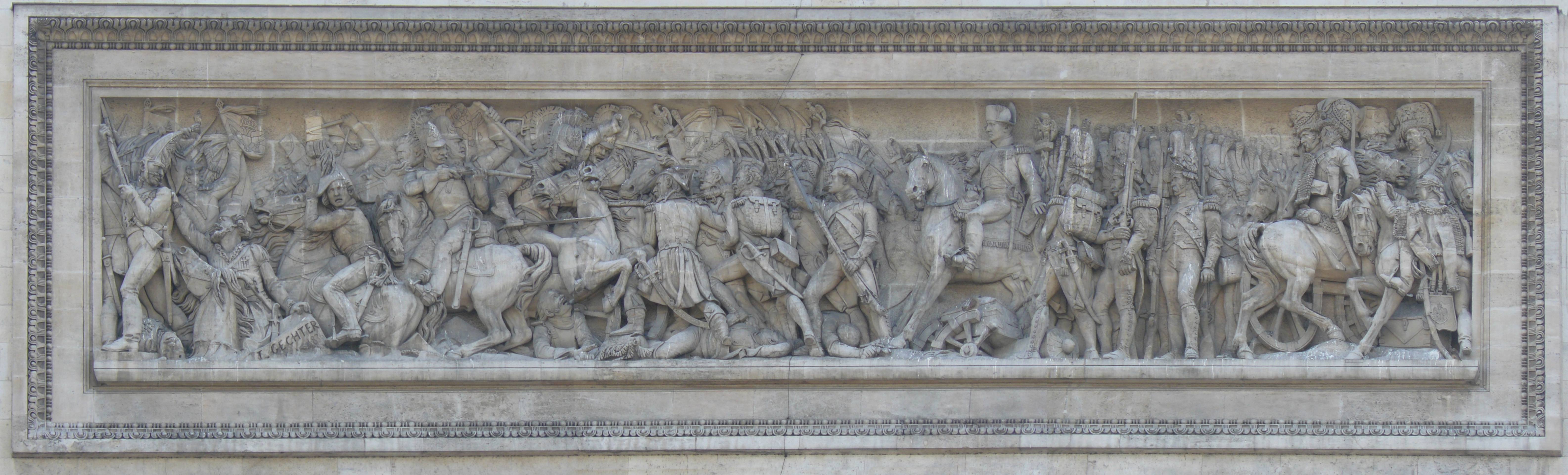 Bas relief du pilier Ouest de l'Arc de Triomphe de l'Étoile à Paris. La bataille d'Austerlitz - largeur estimée environ 18 mètres, hauteur environ 3,50 mètres - sculpteur Jean-François-Théodore Gechter, entre 1833 et 1836.